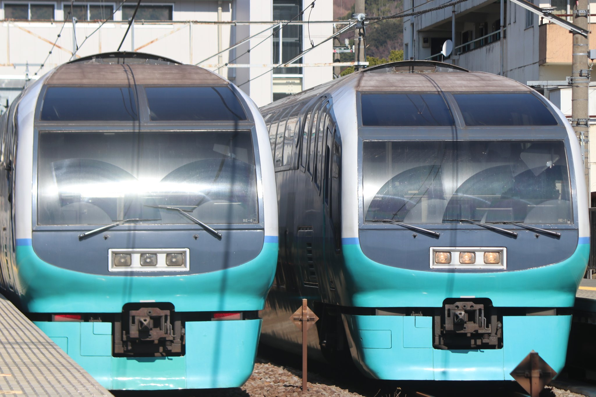 251系の初期車(右)と後期車(左)。